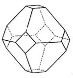 Tesserale Kombination Oktaeder mit Würfel